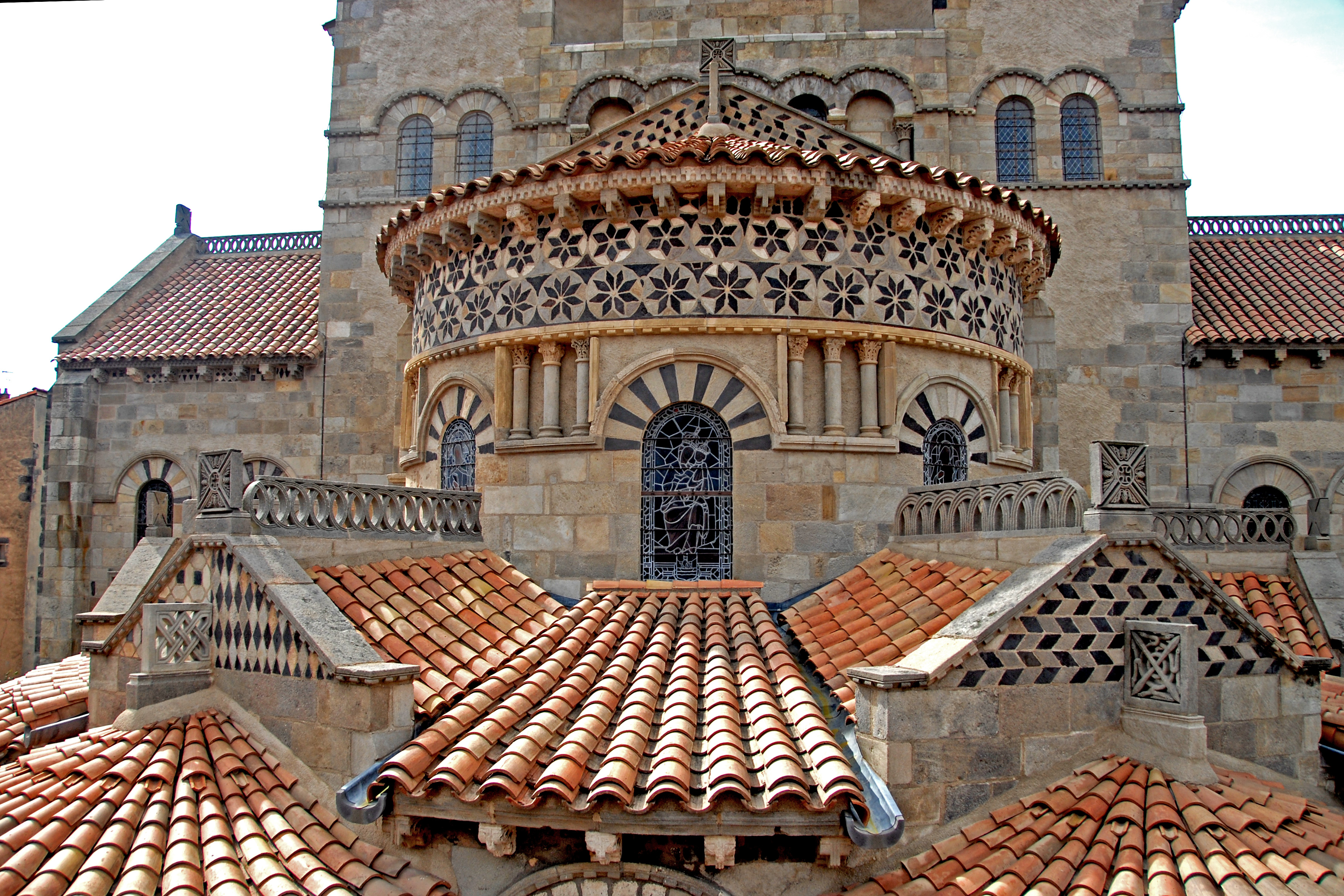 Notre-Dame du Port, Chorapsis von Osten